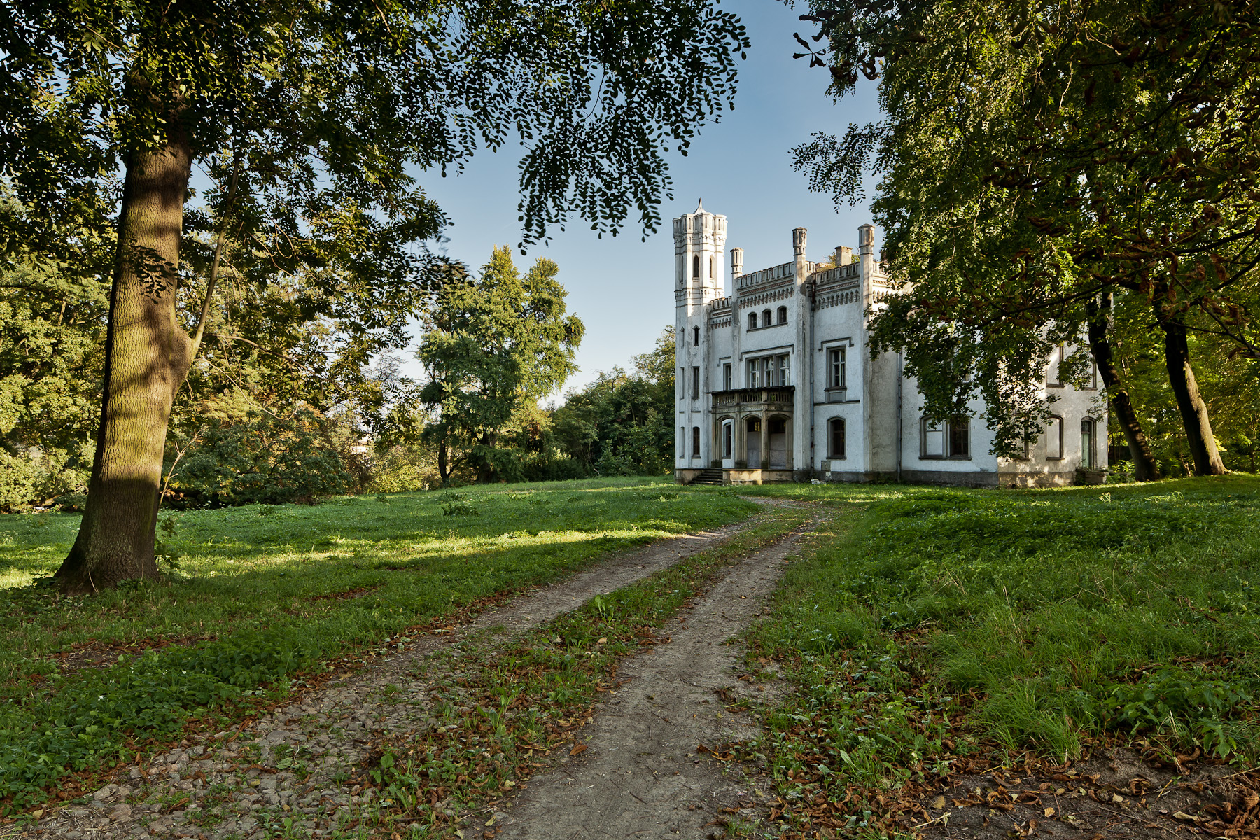 Zespół pałacowy, Piekary - widok na pałac